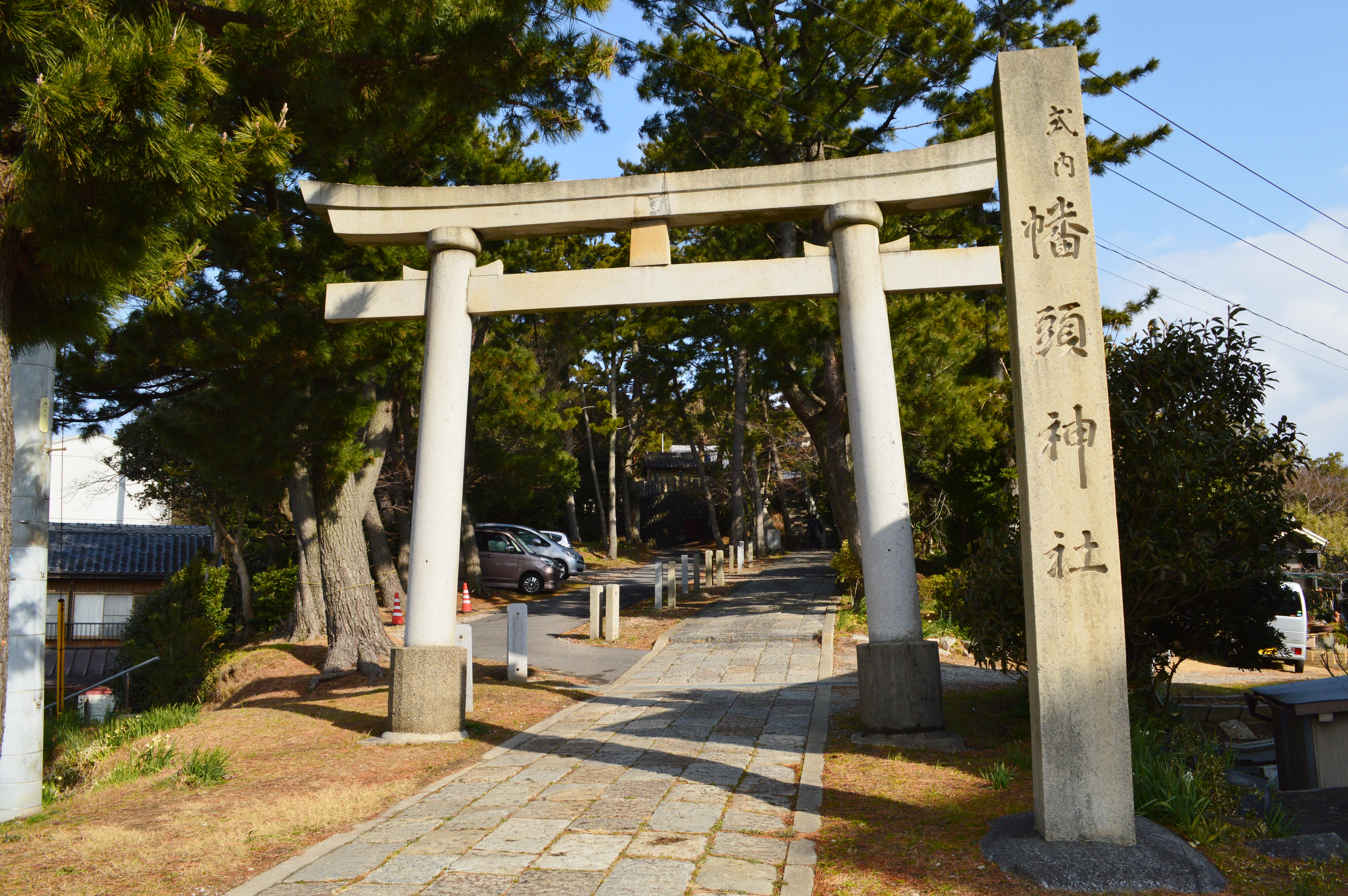 幡頭神社 鳥居